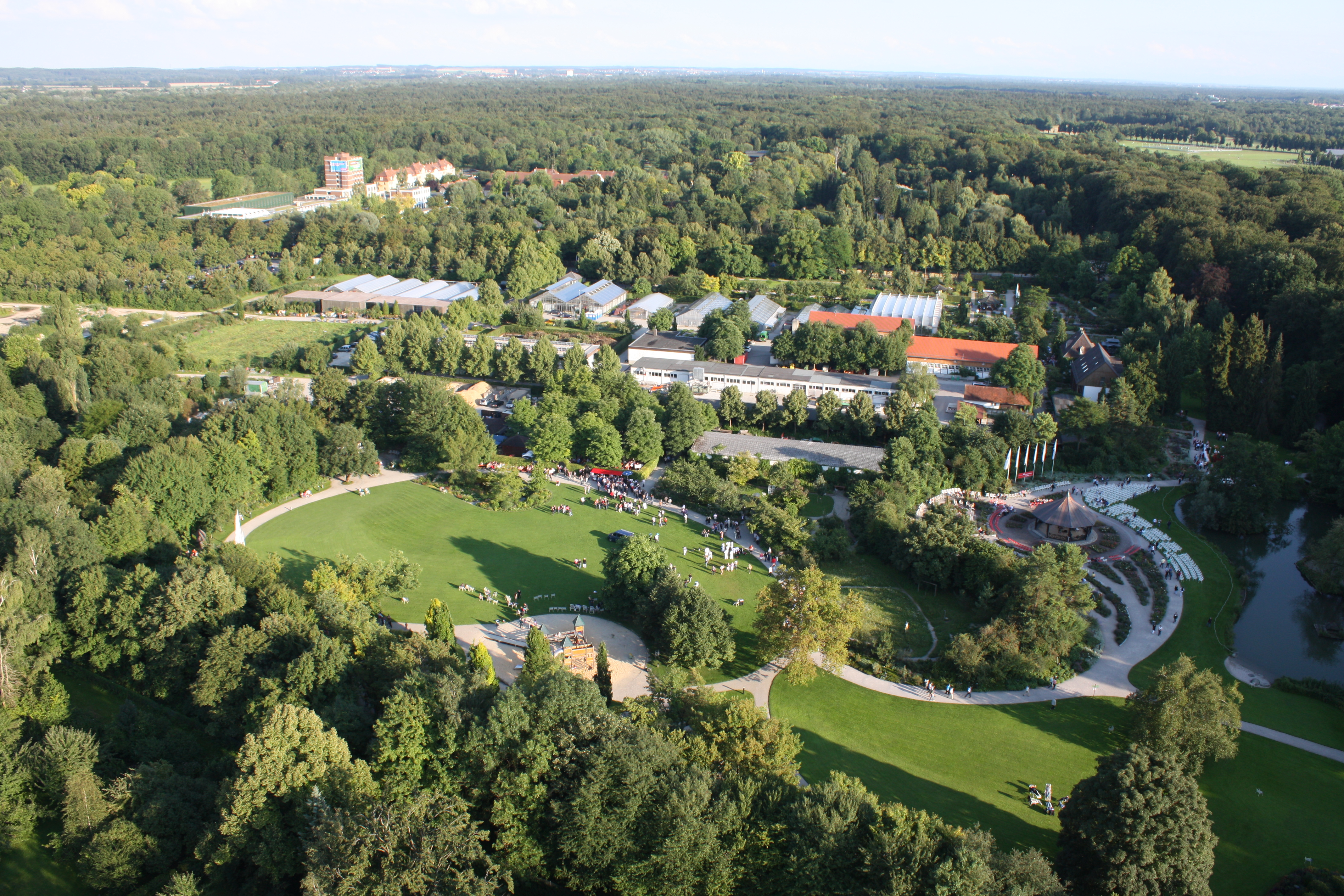 Botanischer Garten aus der Luft (Fotografiert aus einem Heißluftballon), Blick Richtung Süden auf den Siebentischwald (Hintergrund)